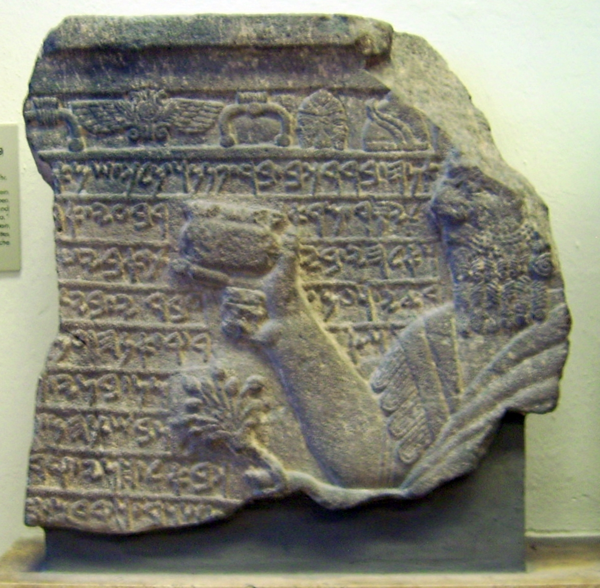 Bruchstück einer Basalt-Reliefplatte aus Sam'al; um 730 v. Chr.; Vorderasiatisches Museum Berlin.